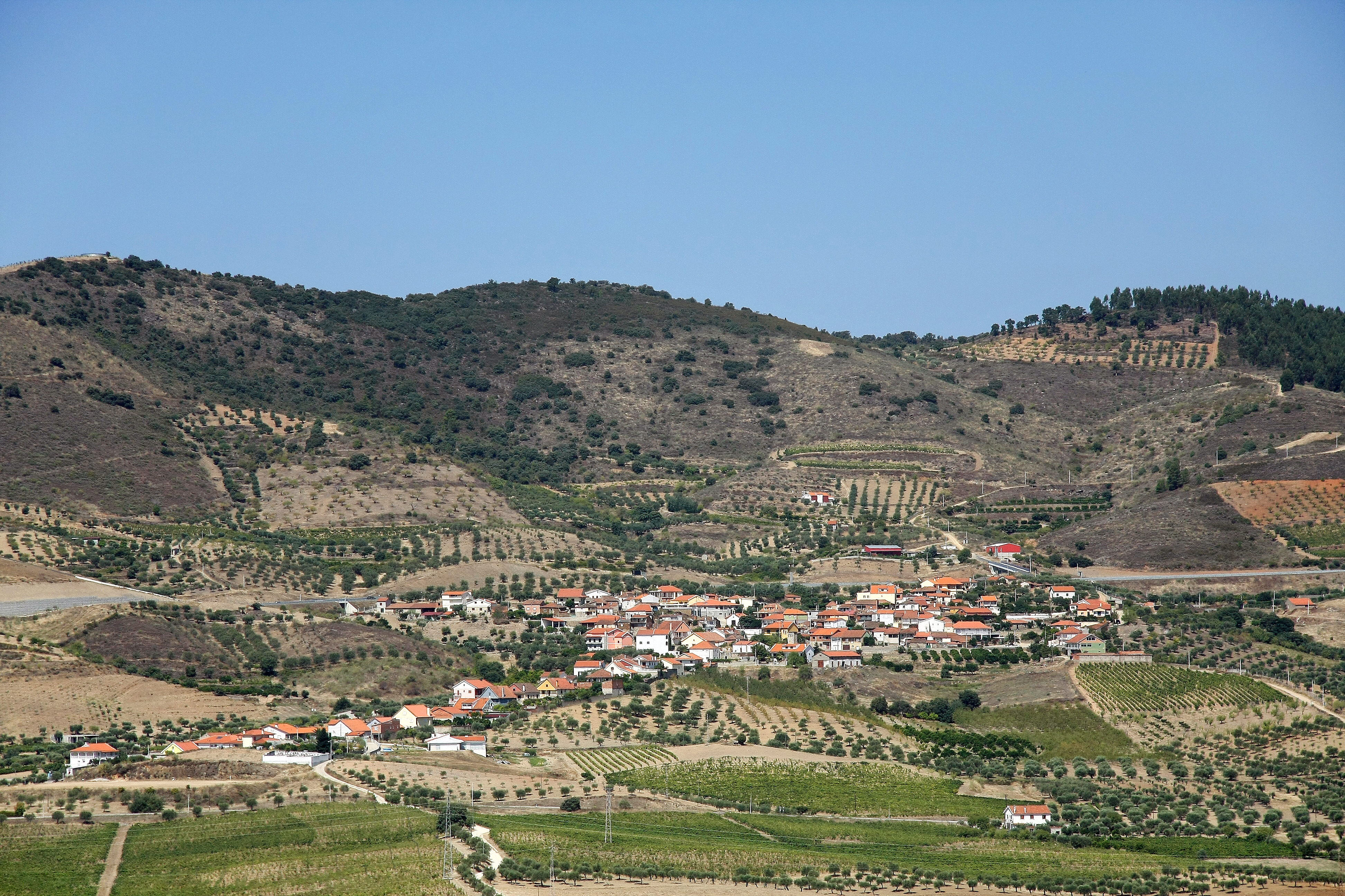 Assares - Portugal